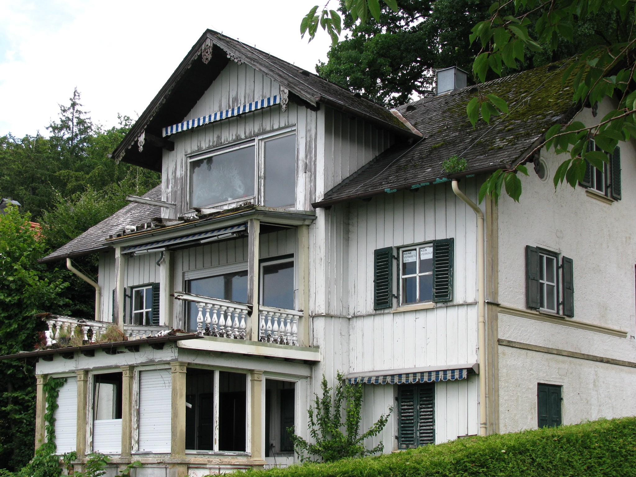 Ammerland Südliche Seestraße 29; Landhaus mit Giebelrisalit, Veranda und Balusterbalkonen, im Kern erbaut 1871, von dem Maler Gabriel v. Max als Künstlerhaus ausgebaut; um 1900 Erweiterung nach Osten und Ausstattung durch Emanuel v. Seidl; nicht im Bild: sog. Spiel- und Kinderhaus, kleiner Holzbau mit Bundwerk unter Verwendung älterer Teile, um 1900; gusseiserne Brunnensäule, Ende 19. Jh., im Garten